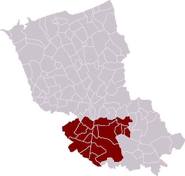 Locatie Kantons van Hazebroek in het arrondissement Duinkerke, Frankrijk - zelfgemaakt Location Cantons of Hazebrouck in the Dunkirk district, France - self made Localisation Cantons d'Hazebrouck dans l'arrondissement de Dunkerque, France - fait moi-même